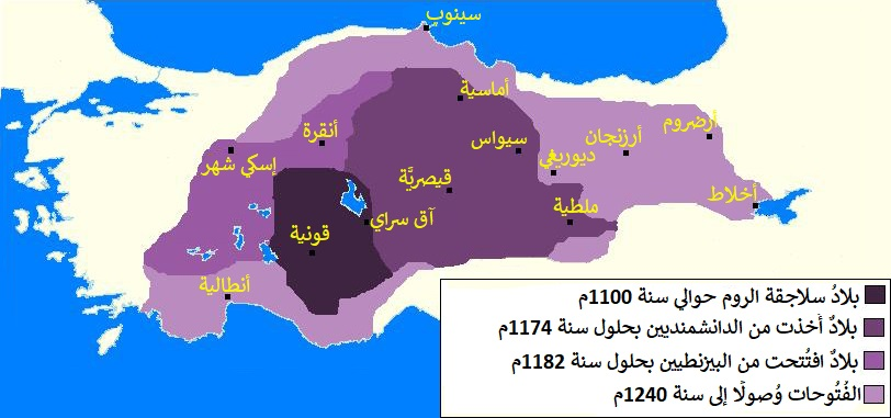 خارطة لسلطنة سلاجقة الروم في سنة 1243. الصانع الأصلي صنع هذه الخريطة باستخدام